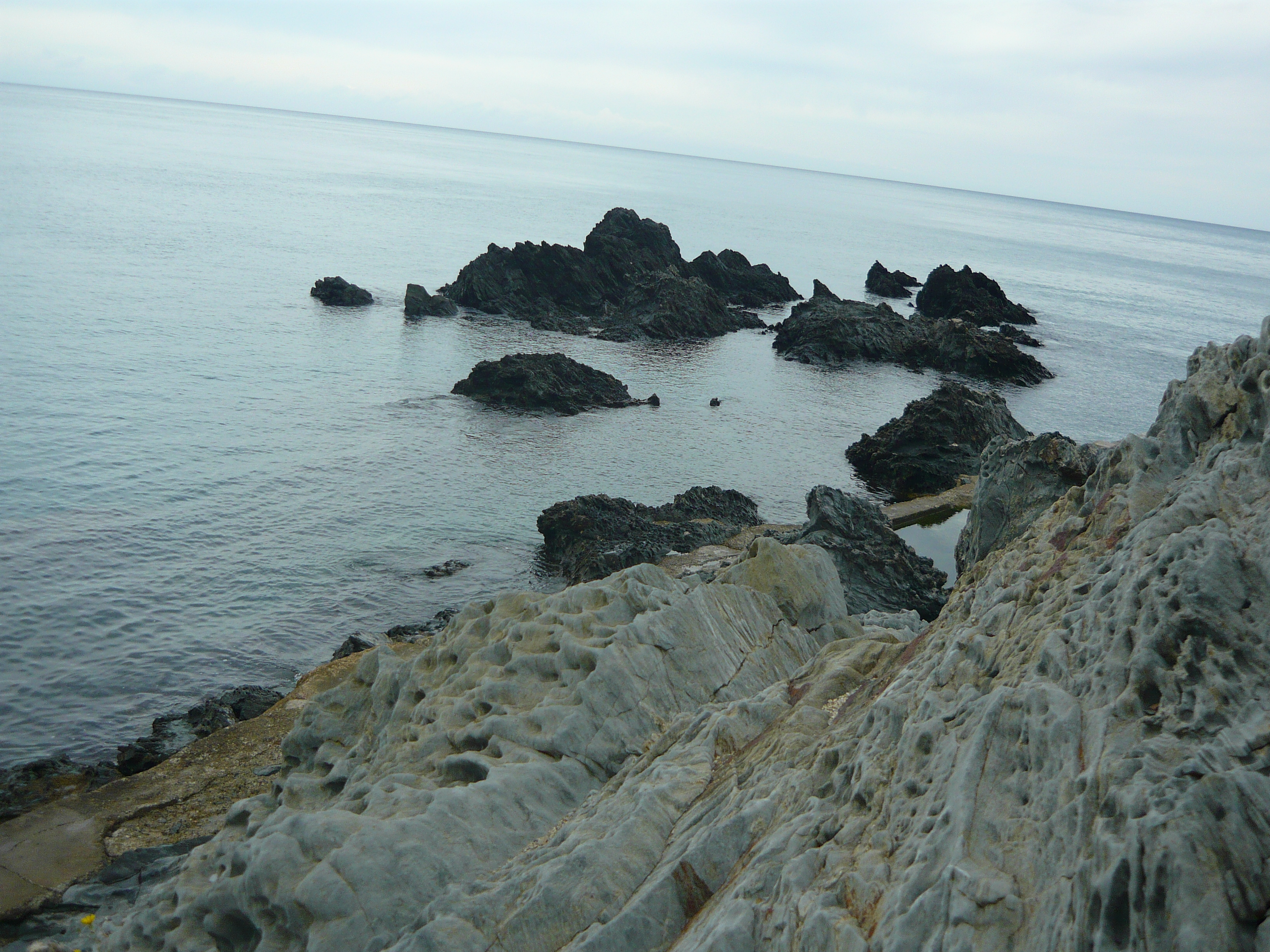 tout au bout de la Terre